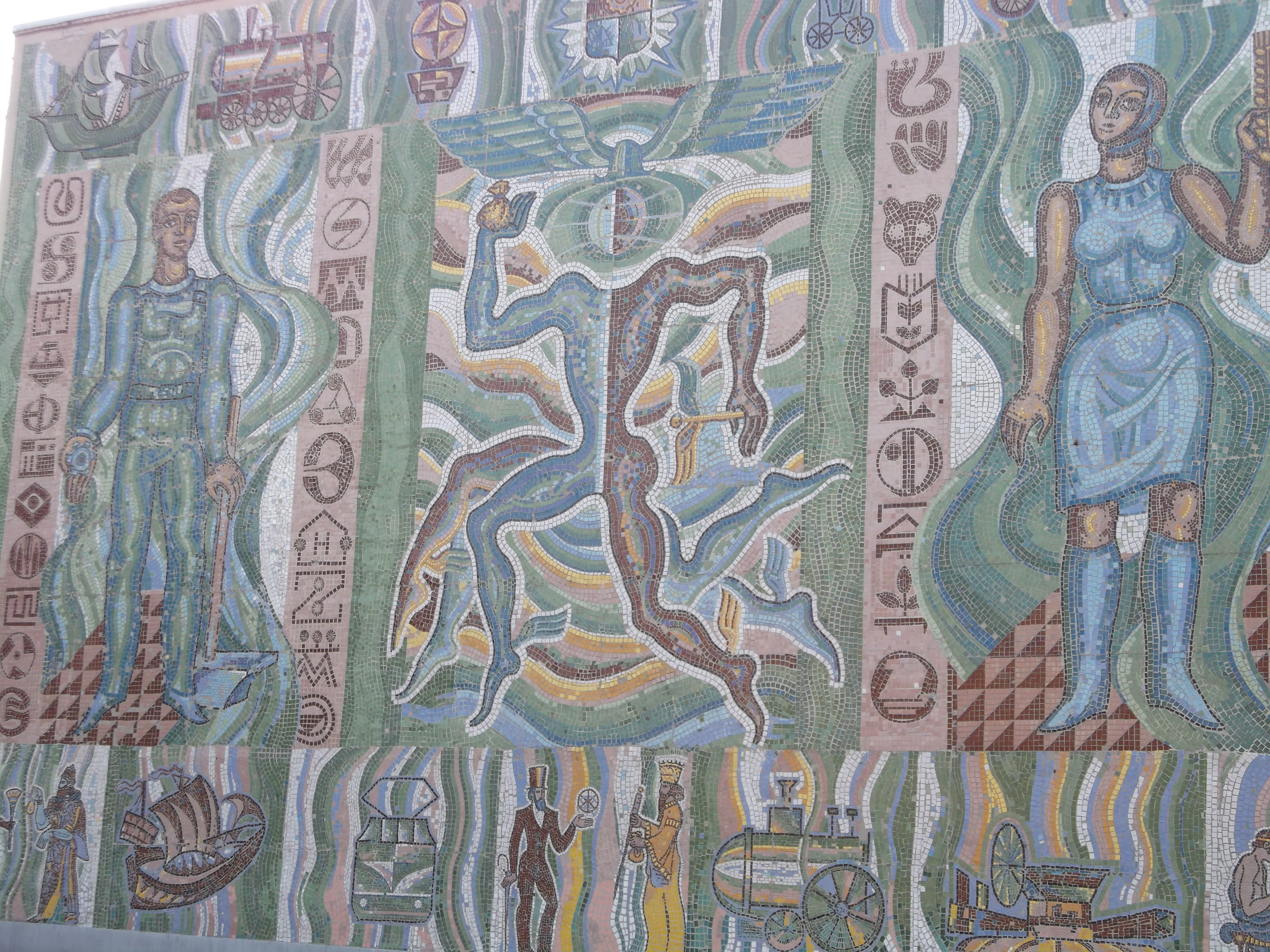 г. Курган